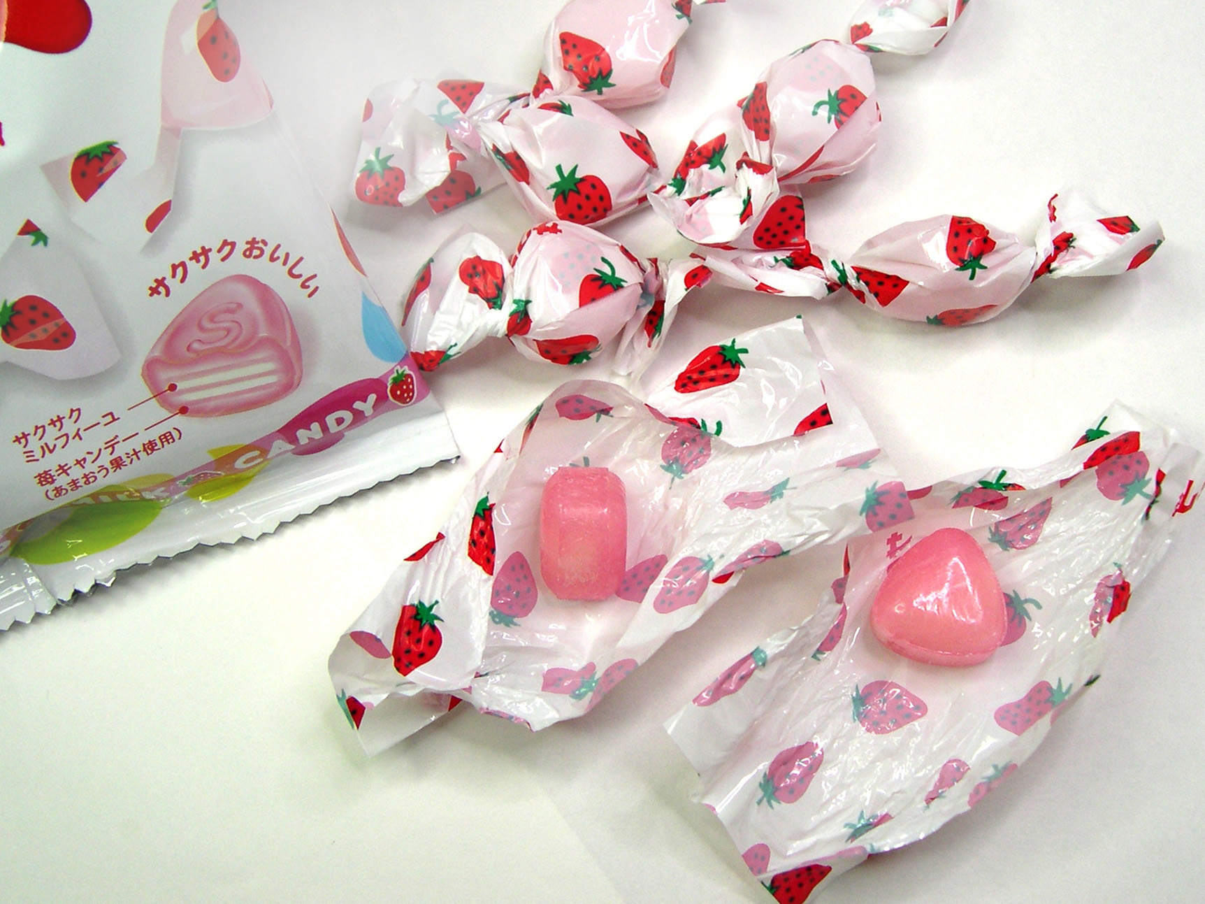 商品名: サクマいちごみるく 内容量： 115g（個包装を含む） 販売者： サクマ製菓株式会社 原材料： 砂糖、水飴、全粉乳、植物油脂、いちご果汁（あまおう100%）、食塩、酸味料、香料、ビタミンC、着色料（アントシアニン）、乳化剤、（原材料の一部に大豆を含む） 賞味期限： 2012年1月 希望小売価格： 200円（税別） 栄養成分表 1粒標準3.5g当たり エネルギー： 15kcal 炭水化物： 3.2g たんばく質：0.044g ナトリウム： 0.62mg 脂質： 0.21g ビタミンC： 4.2mg 飴1個の重さ： 3.5 - 3.6g 飴1個の厚み： 12㎜ 飴1個の高さ： 18㎜ 飴1個の横幅： 18.5㎜